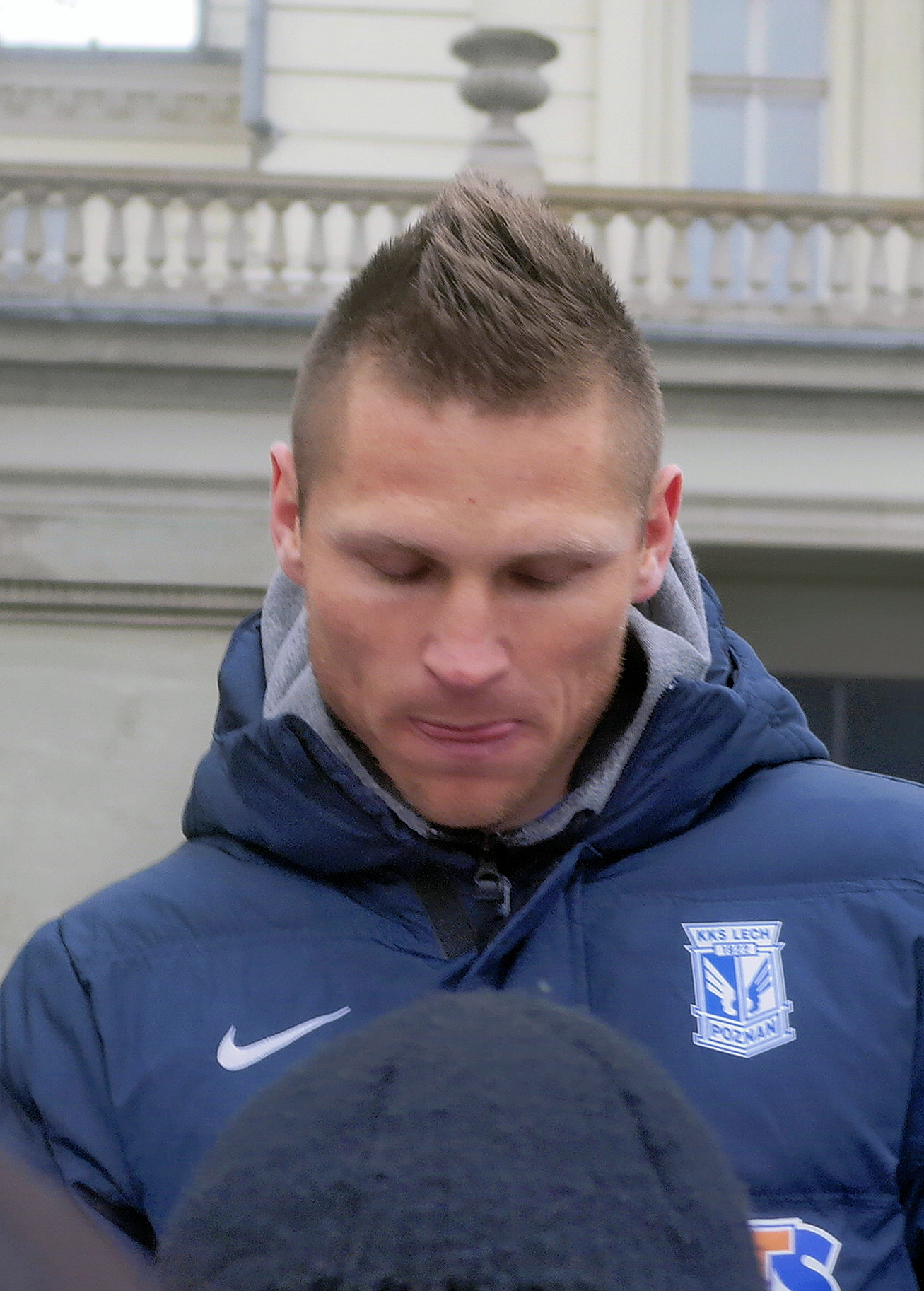 Marcin Robak, piłkarz Lecha Poznań podczas akcji "Pierwszy Gwizdek" na Placu Wolności w Poznaniu